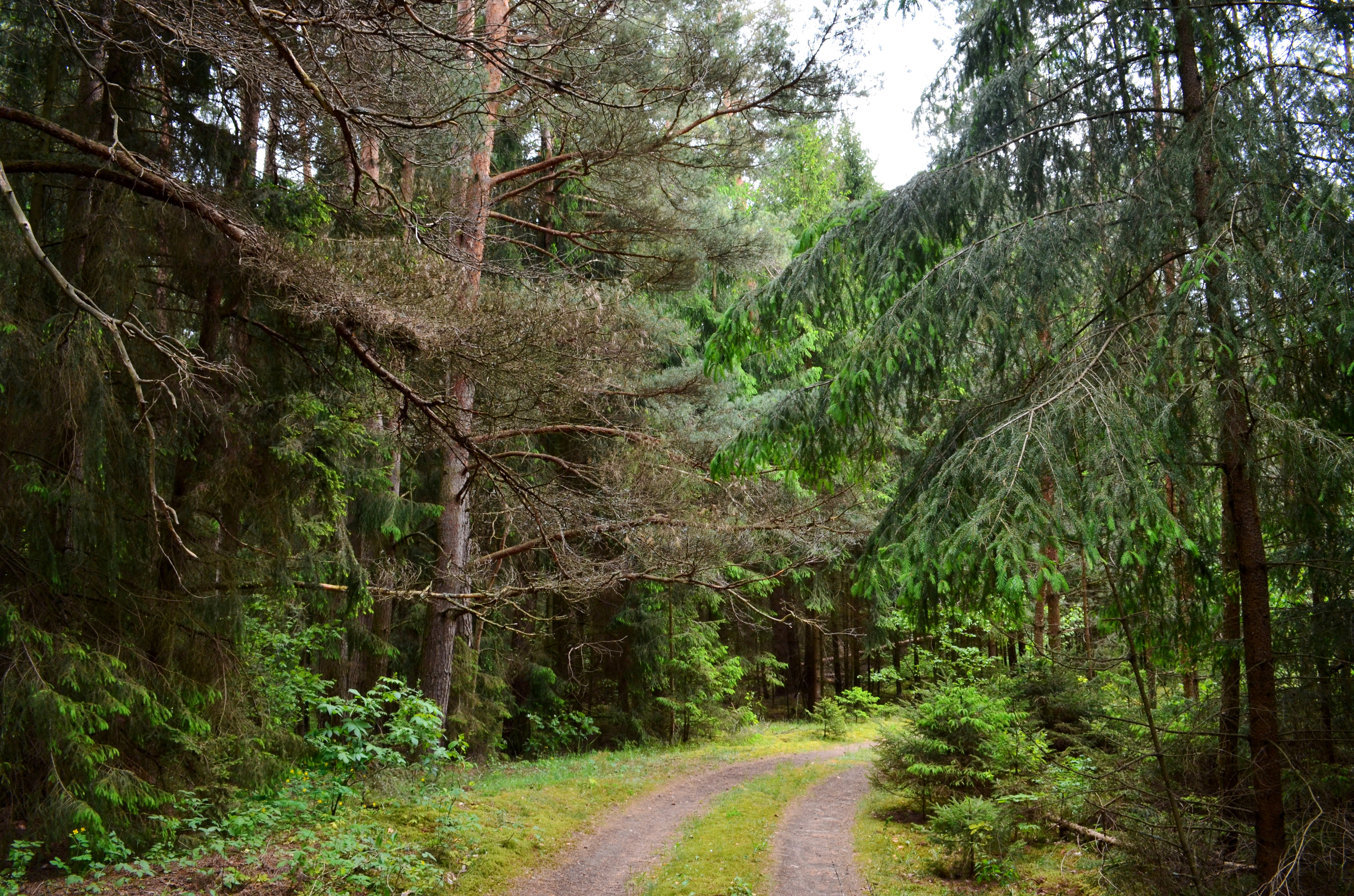 Anykščių miškai prie Vetygalos, Anykščių raj.